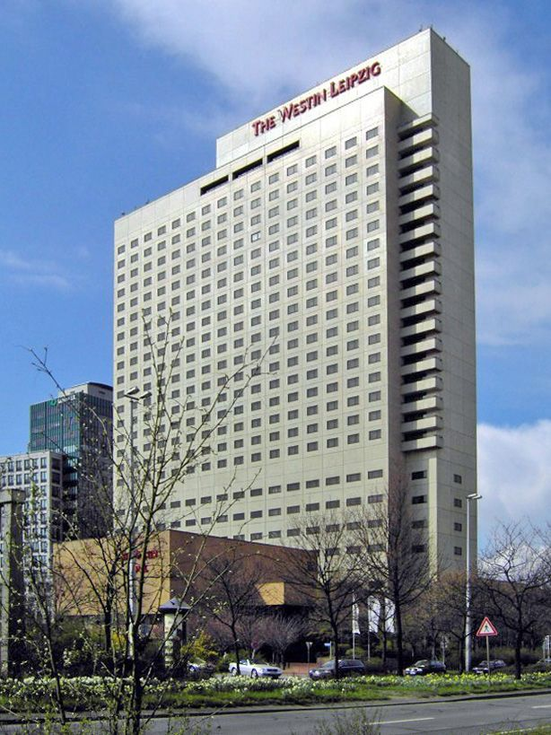 Hotel The Westin Leipzig